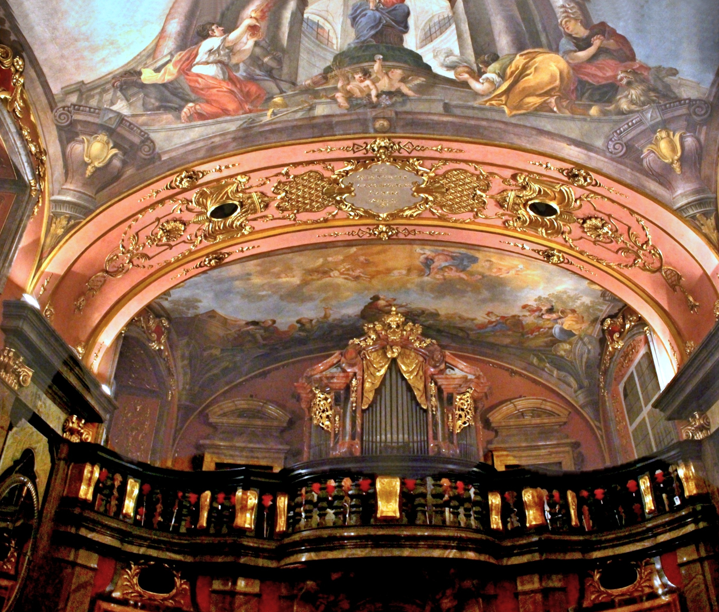 Klementinum, Zrcadlová kaple